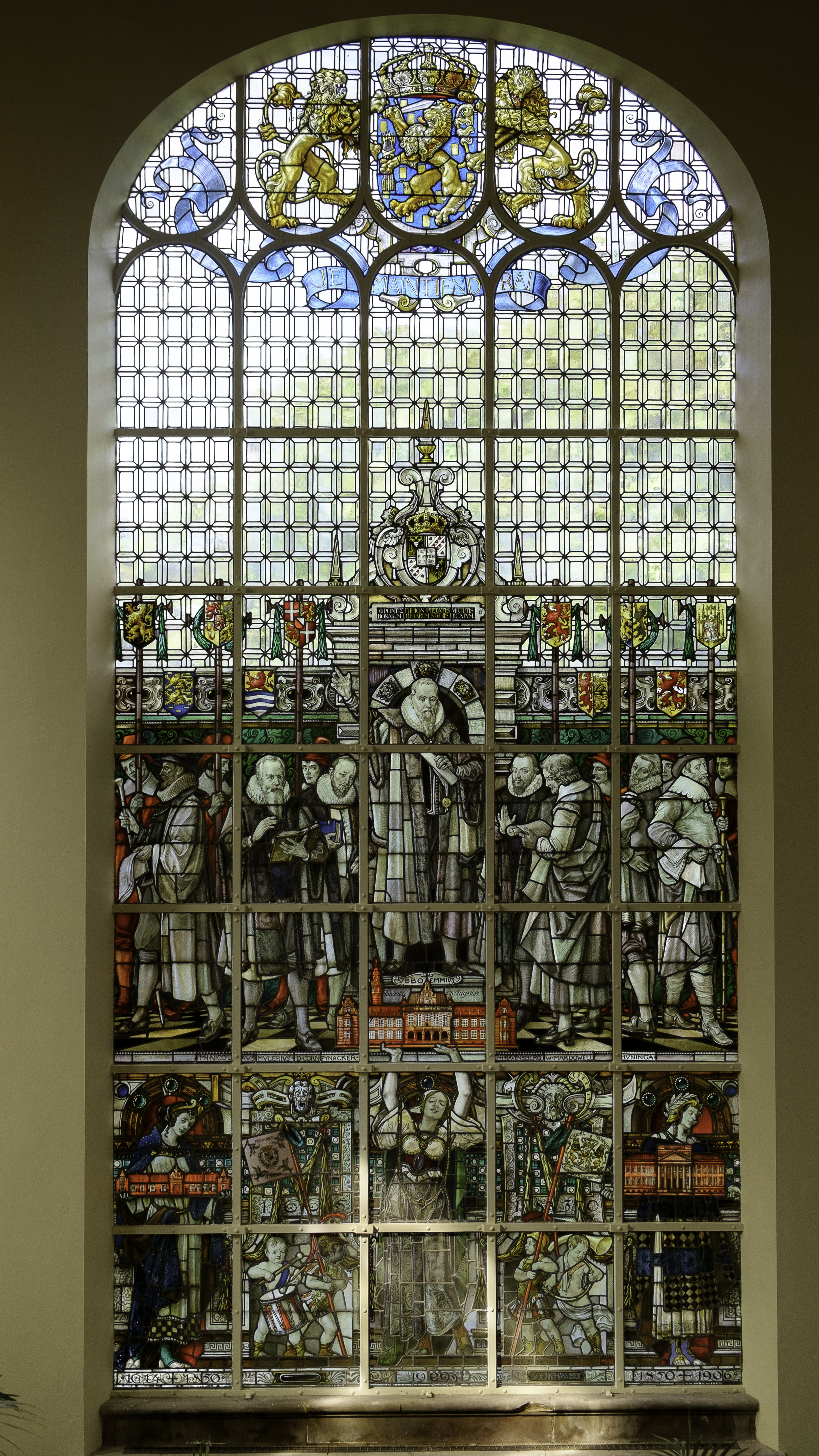 Gebrandschilderd glas in het trappenhuis van het Academiegebouw met de beeltenissen van Ubbo Emmius, Nicolaus Mulerius, Cornelis Pijnacker, Hermann Ravensberger, William Makdowell en 'Huninga'. Met Huninga wordt vermoedelijk Johan Huninga (1584-1639) bedoeld. Glas gemaakt door de gebroeders Otto Linnemann en Rudolf Linnemann (1909).